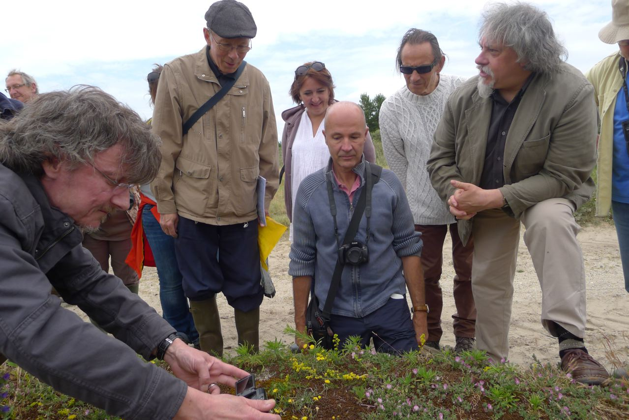 CSENPC observation botanique baie de Somme